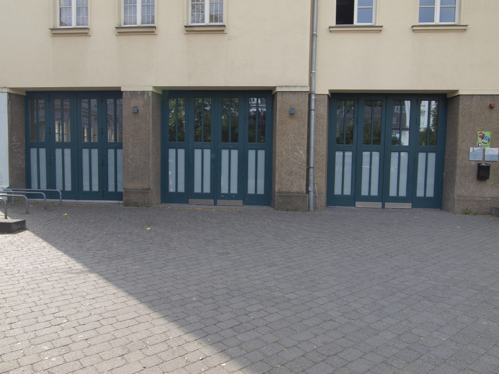 Ehemalige Feuerwehrwache Elberfeld, südlicher Teil. In der Straße Gathe 6, Wuppertal, Quartier Nordstadt. Sie ist Station der Themenroute „Fäden, Farben, Wasser, Dampf". Teil Nr. 9.10 der Route Elberfelder Nordstadt - Ostersbaum. Denkmalnr. 3192 This is a photograph of an architectural monument. 3192